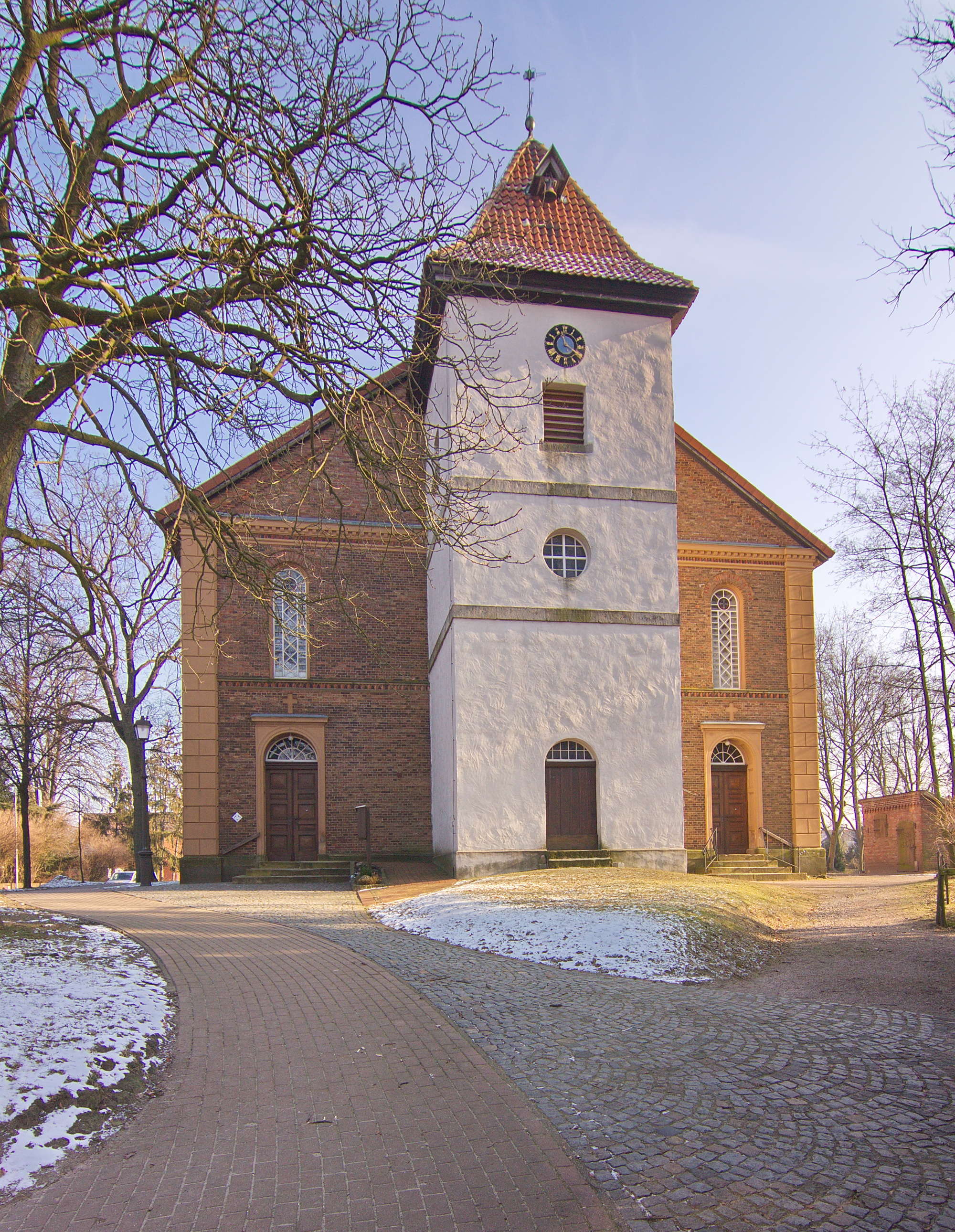 Kirche in Brelingen (Wedemark), Niedersachsen, Deutschland.